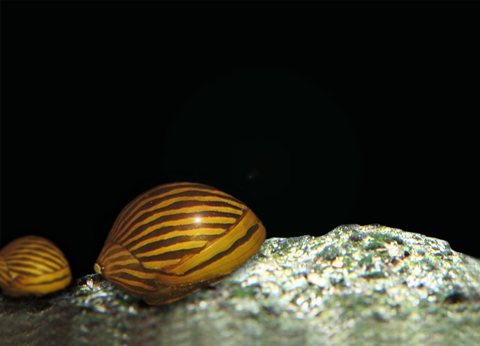 Neritina natalensis